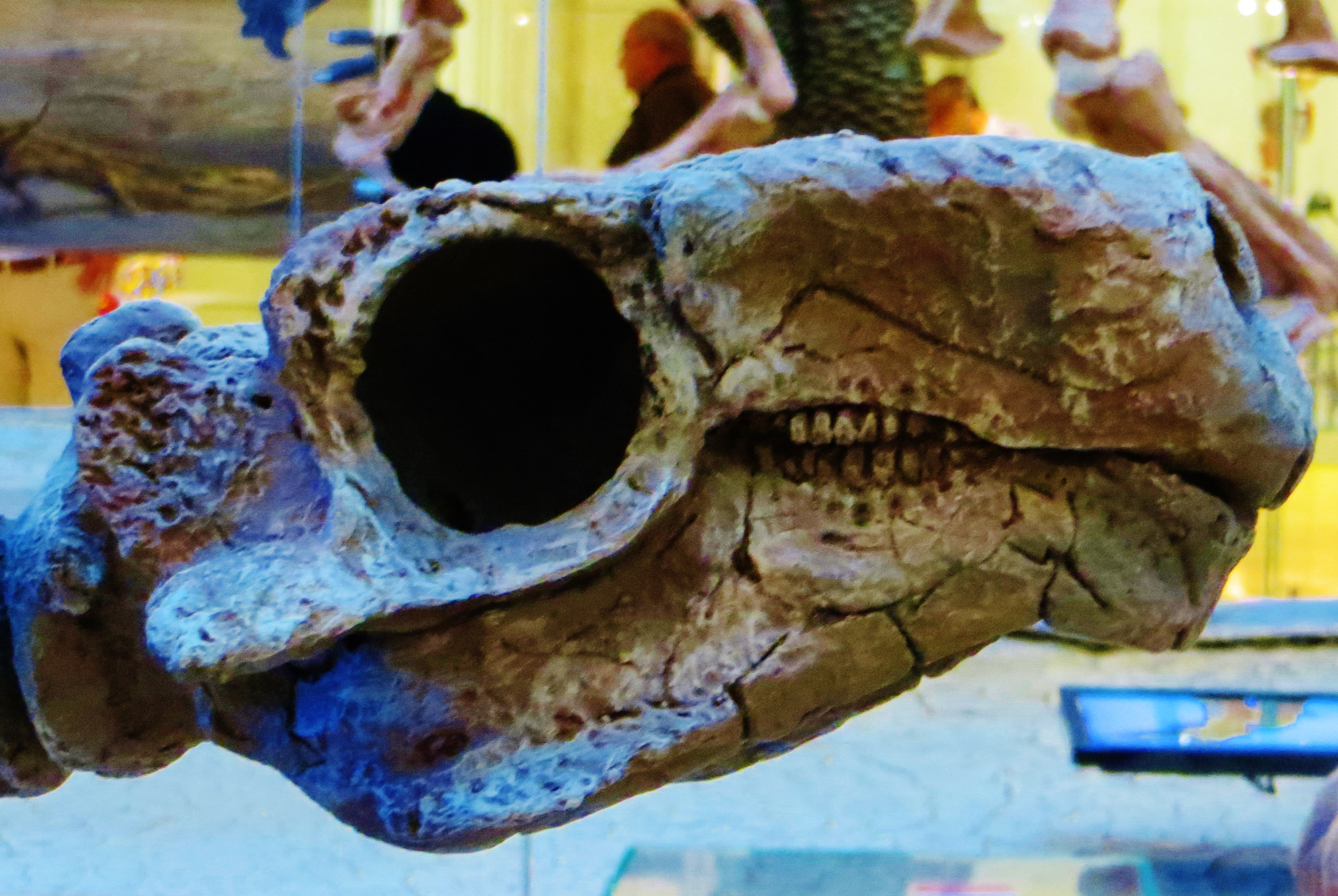 Fossil of Talarurus, an extinct reptile- Took the picture at Muse (Trento)